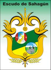 escudo de sahagun